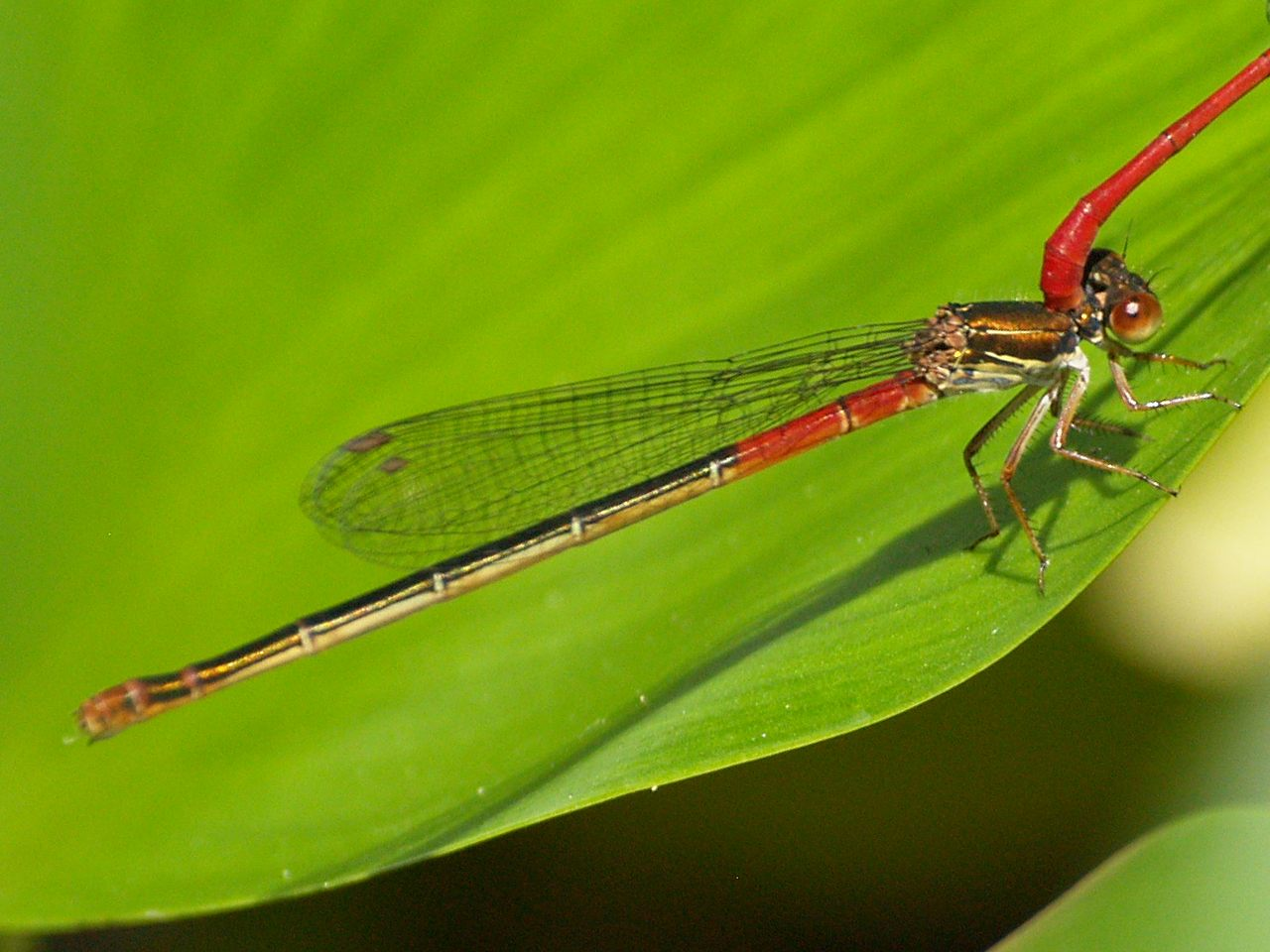 Ceriagrion tenellum femella